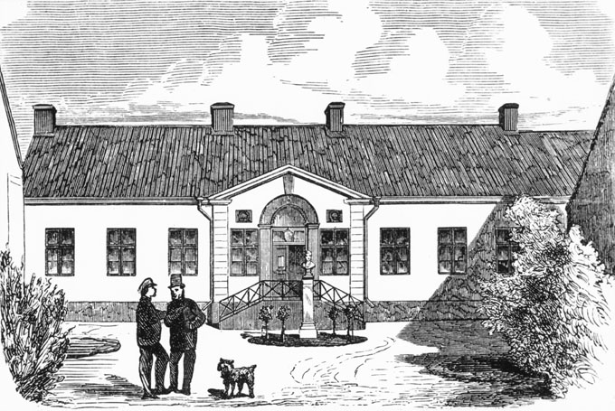 Karolinska institutets laboratorium. Chemicum och stora auditorium 1817-1865. Byggnaden var ursprungligen Kungsholmens gamla glashytta. Ombyggd för Karolinska institutet 1817. Teckning införd i Illustrerad Tidskrift 1865.